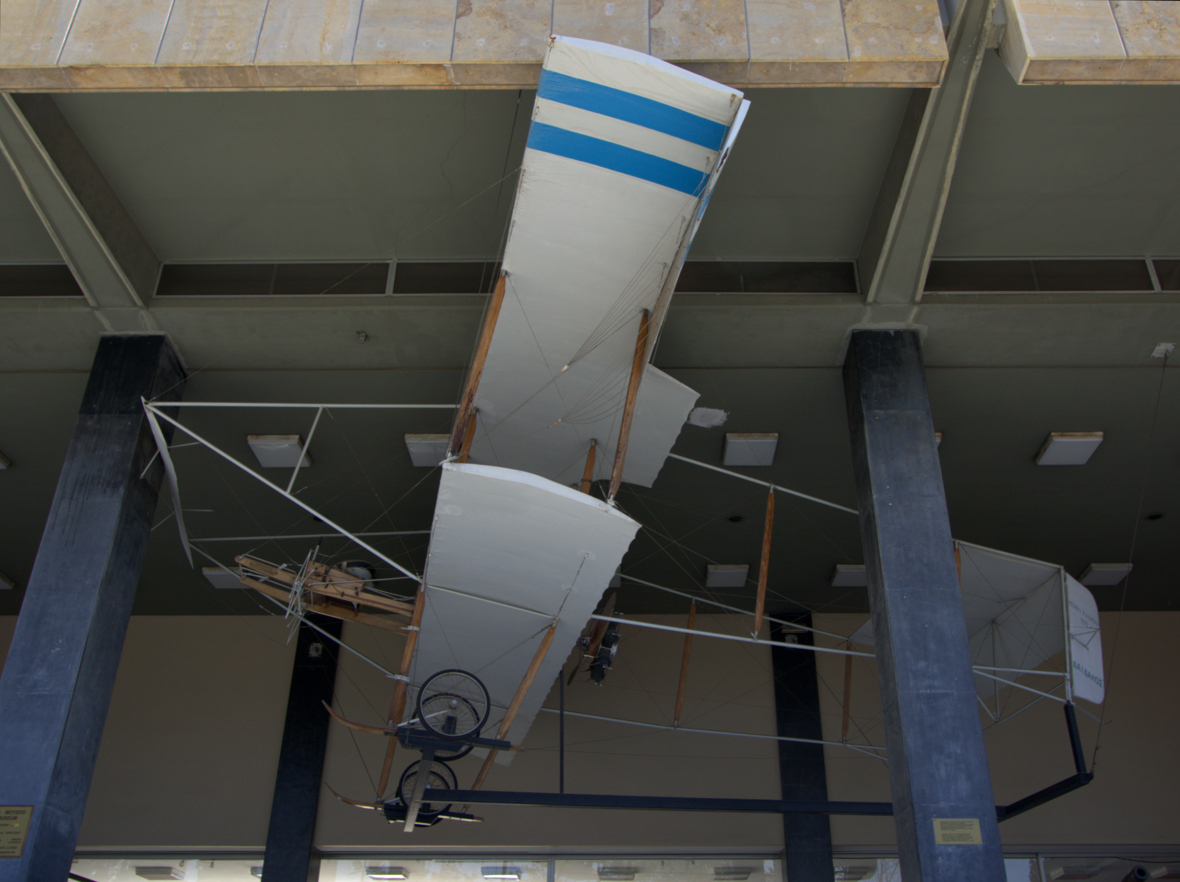 Hellenic War Museum (Athens, Greece). --- Πανομοιότυπο του πρώτου Ελληνικού πολεμικού αεροπλάνου "Δαίδαλος". Πολεμικό Μουσείο Ελλάδος. Αθήνα.